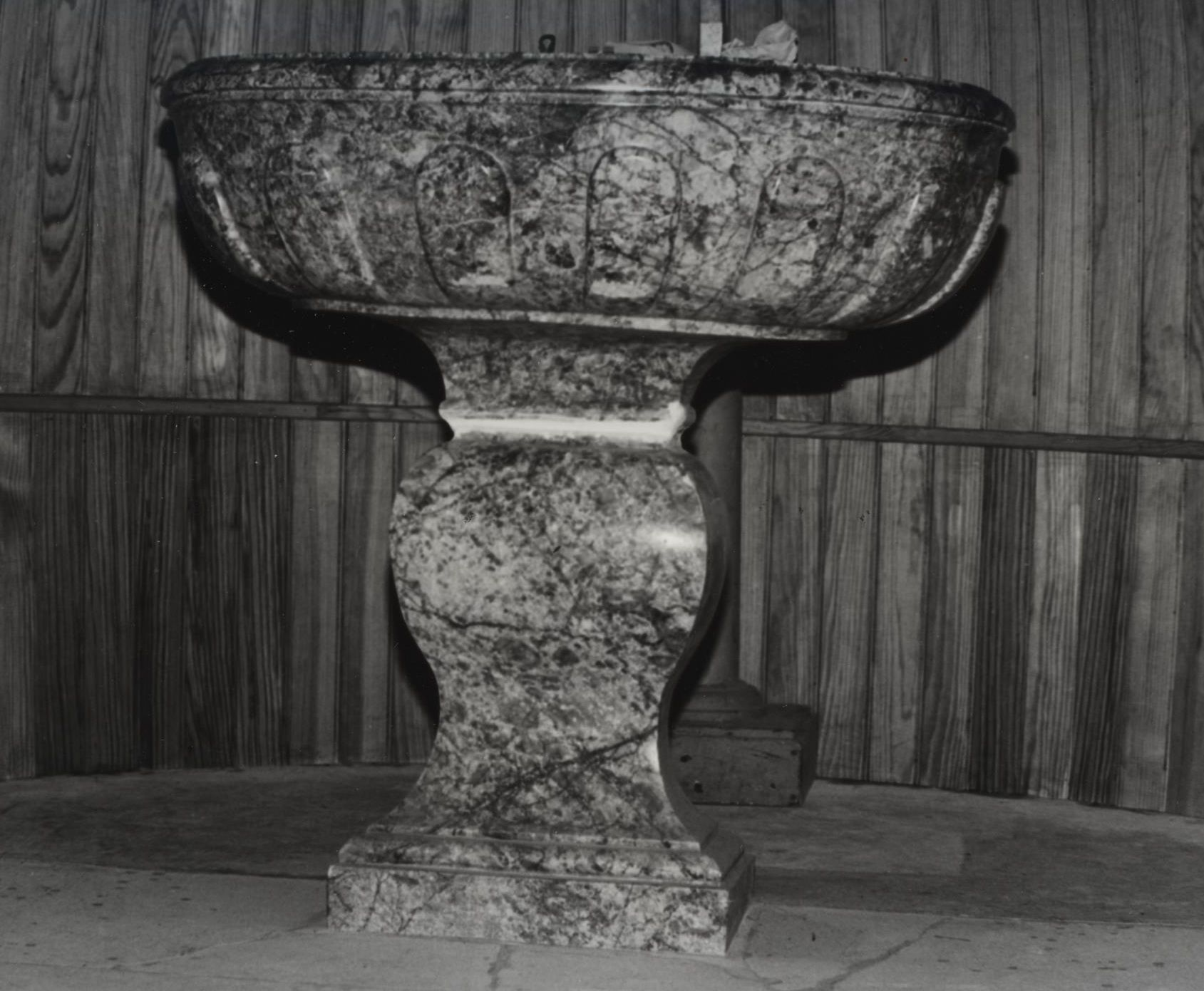 Taufbecken in der Kirche Saint-Cyr-Sainte-Juliette in Diou (Allier)